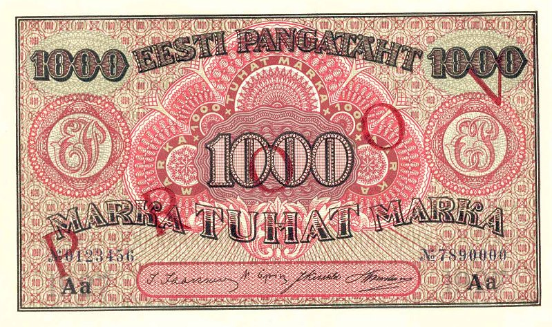 1000. margane Eesti pangatäht aastast 1922; kujundaja Nikolai Triik (1884–1940).